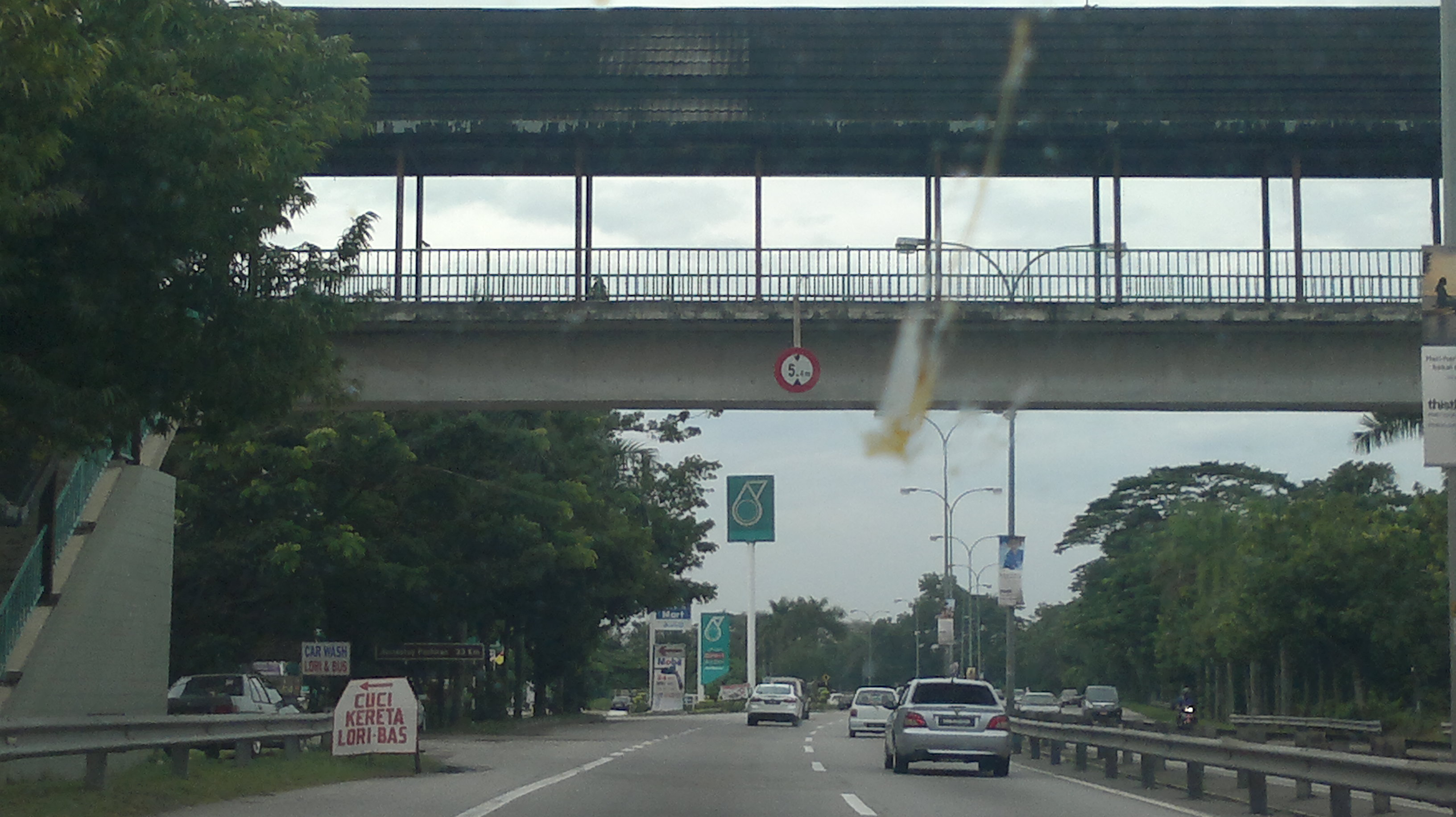 70300 Mambau, Negeri Sembilan, Malaysia